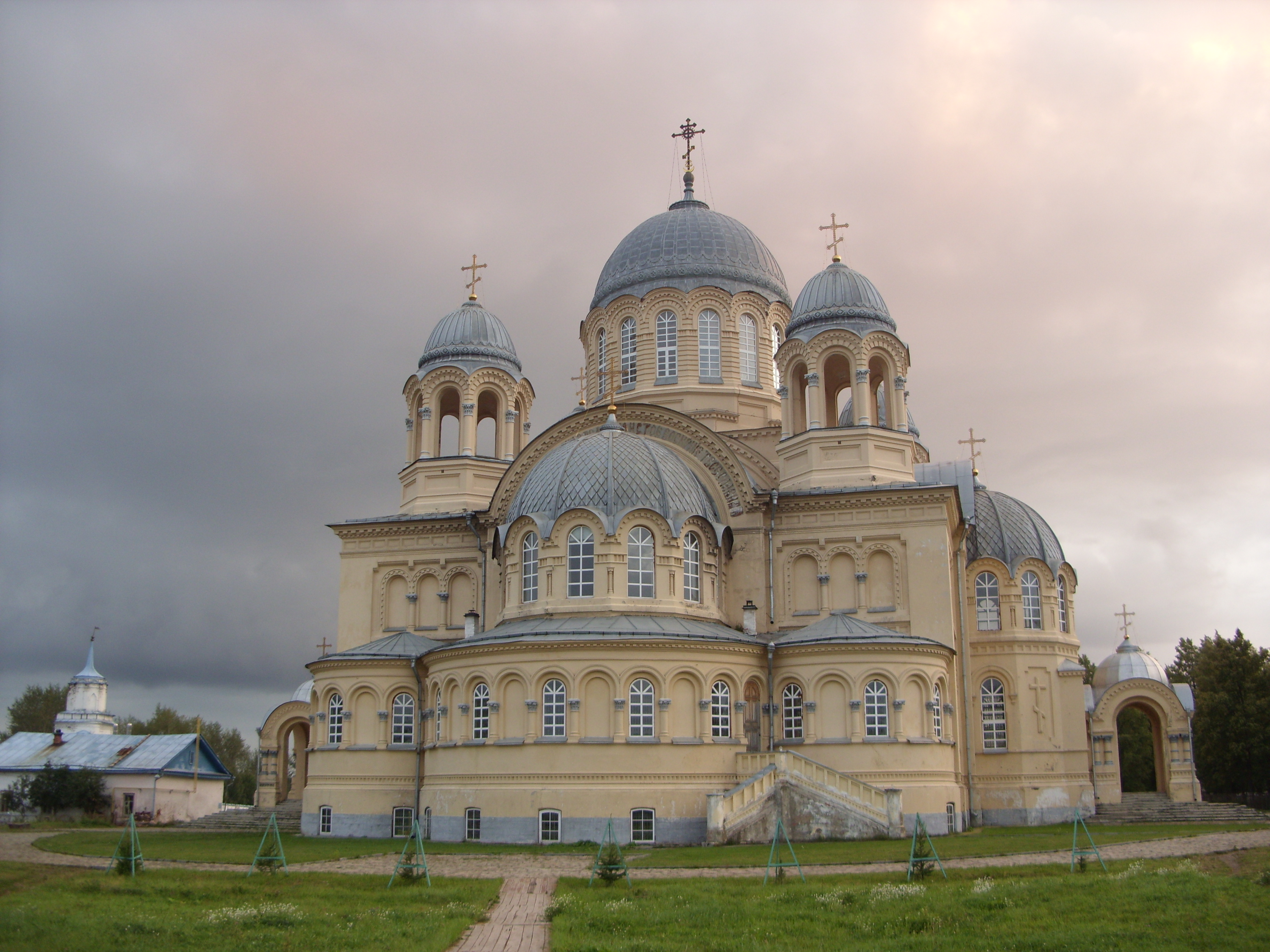 Pravoslavný chrám ve Verchoturje, Rusko